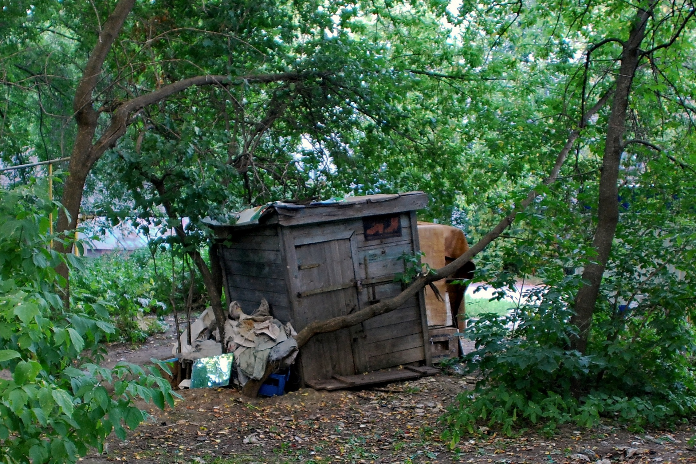 Домик бомжей